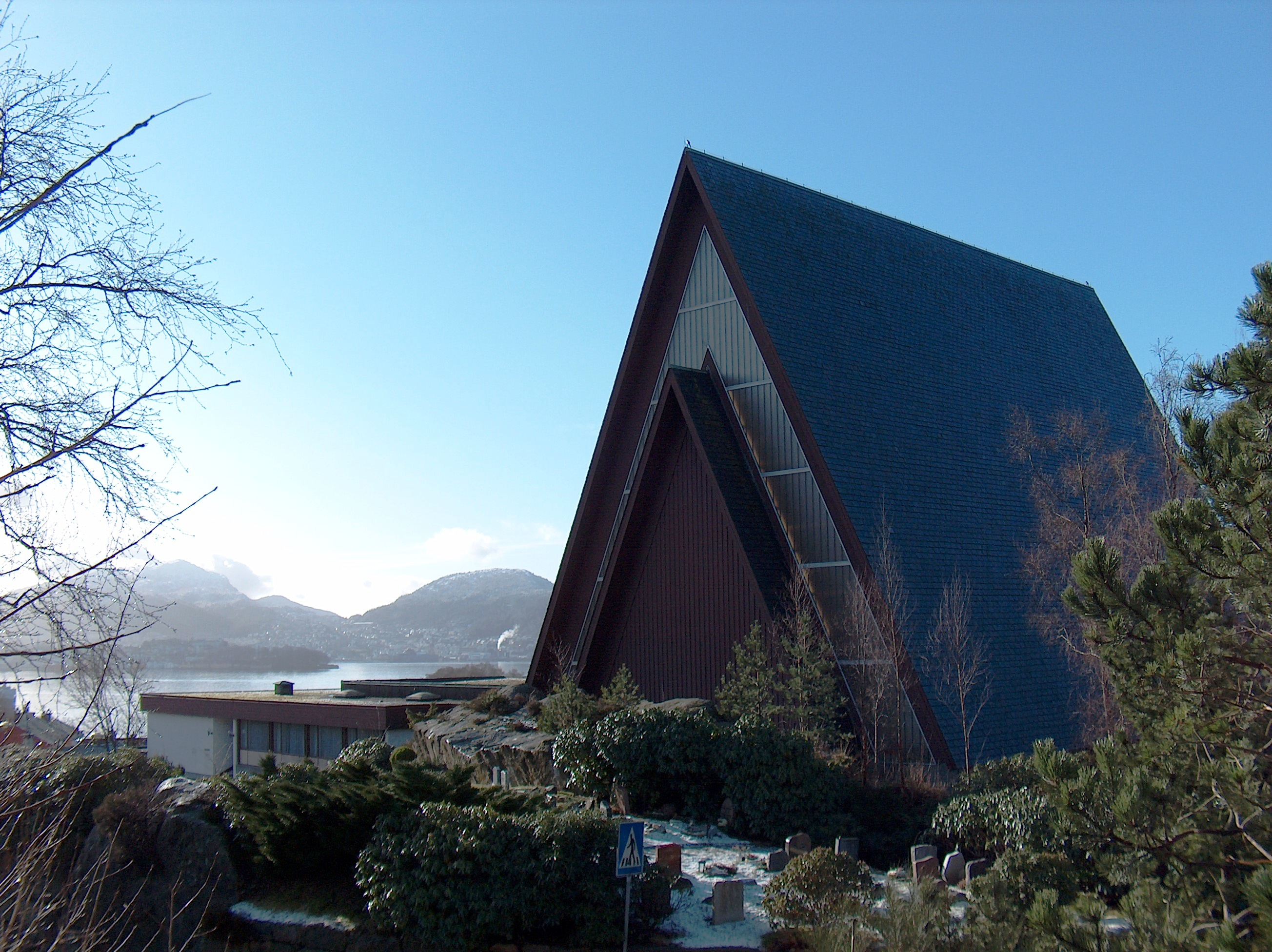 Biskopshavn_kirke